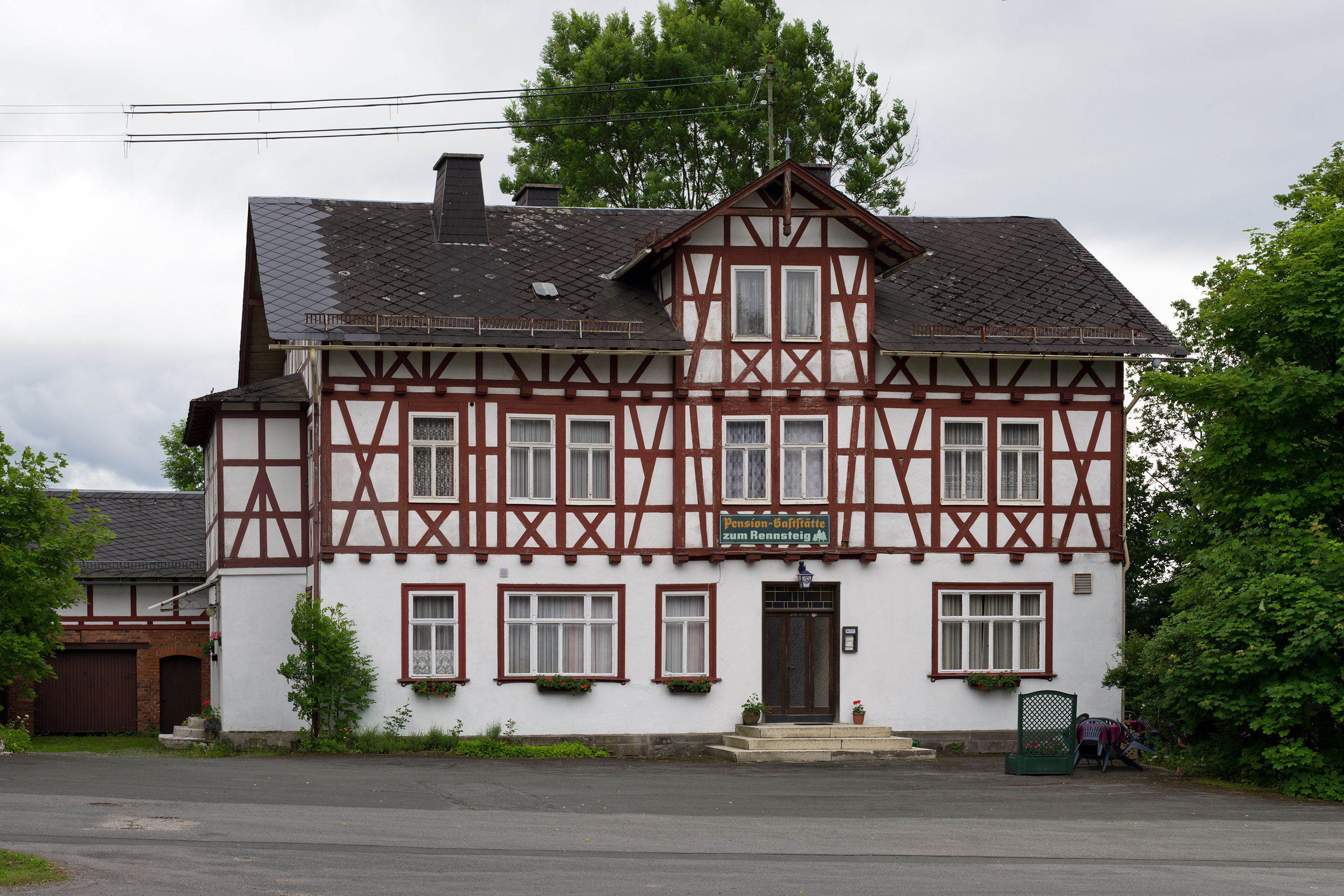 Pension/Gaststätte "Zum Rennsteig", Rennsteigstraße 7 in Steinbach am Wald.